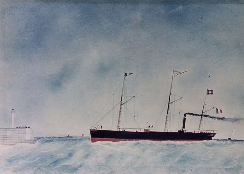 Le Progrès, 1er vapeur de la flotte LAMY, construit en 1872